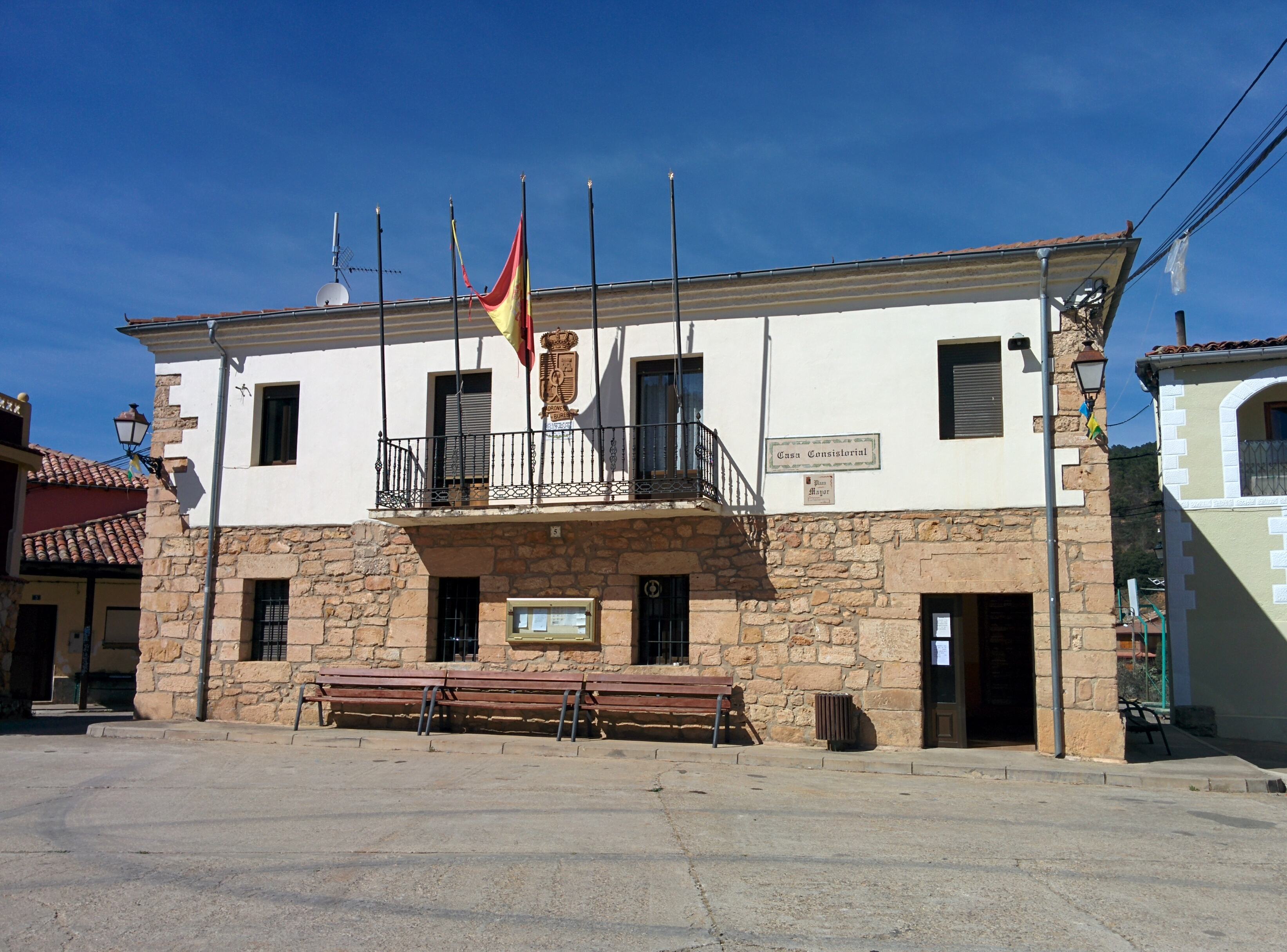 Casa consistorial de Padrones de Bureba (Burgos, España).